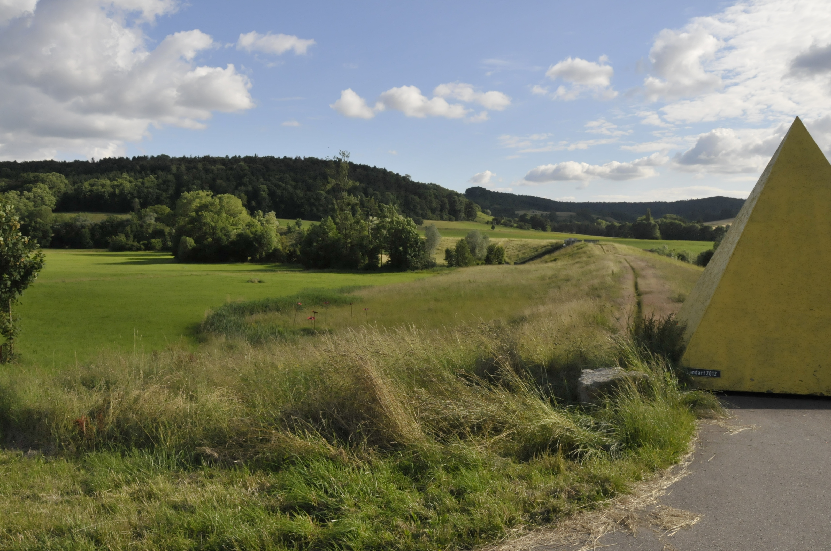 Hochwasserrückhaltebecken der Brettach zwischen Adolzfurt und Geddelsbach